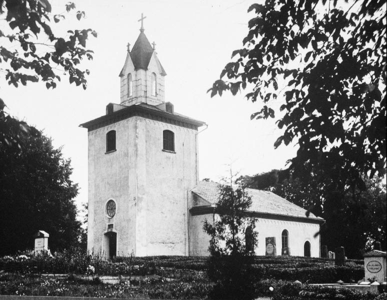 Kyrkan från sydväst. Kategori: (01) ExteriörerKyrkan från sydväst.